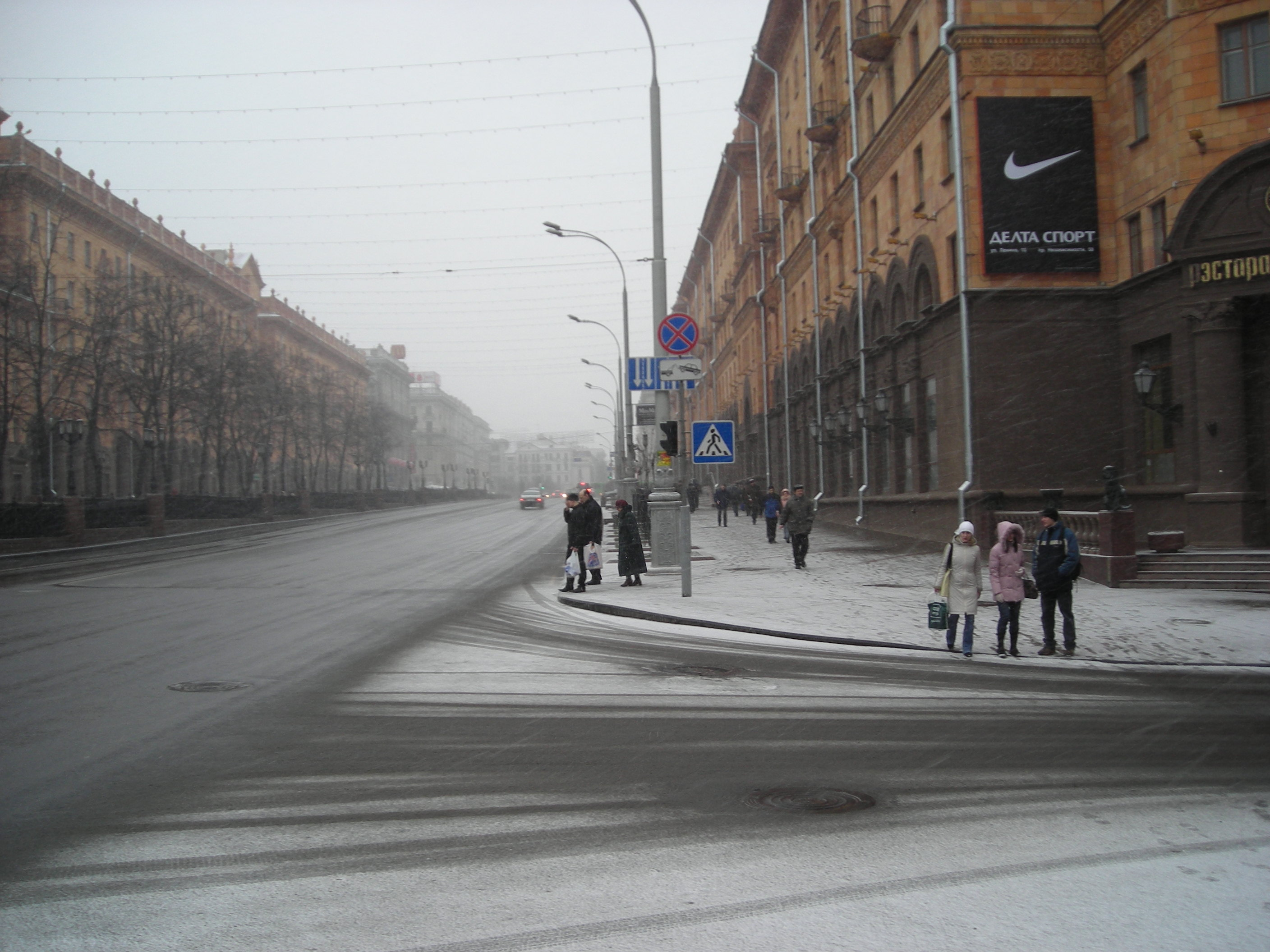 Voul Lenina (street) in Minsk under snow